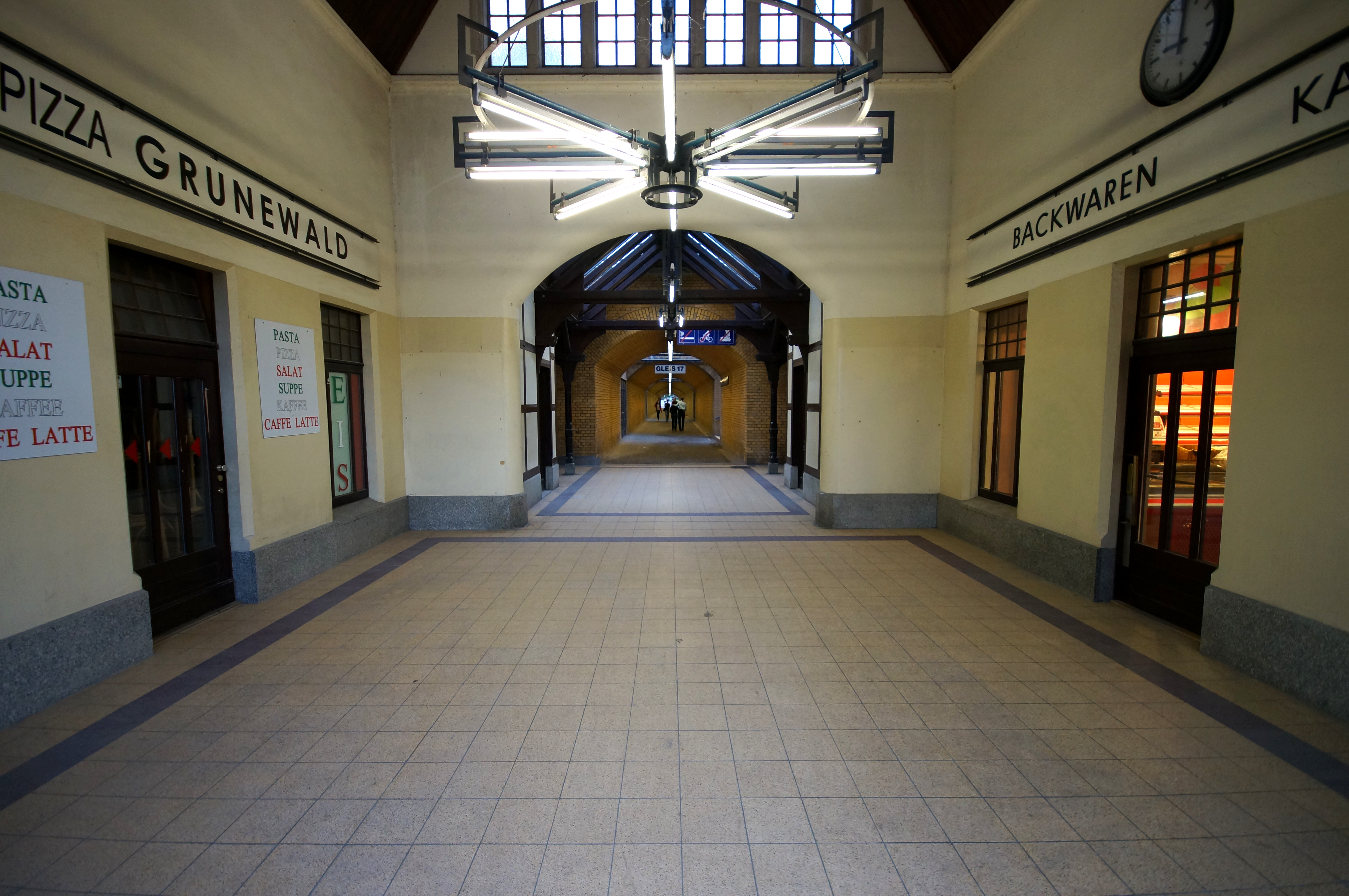 Die Haupthalle des Bahnhofsgebäudes des Bahnhofs Berlin-Grunewald